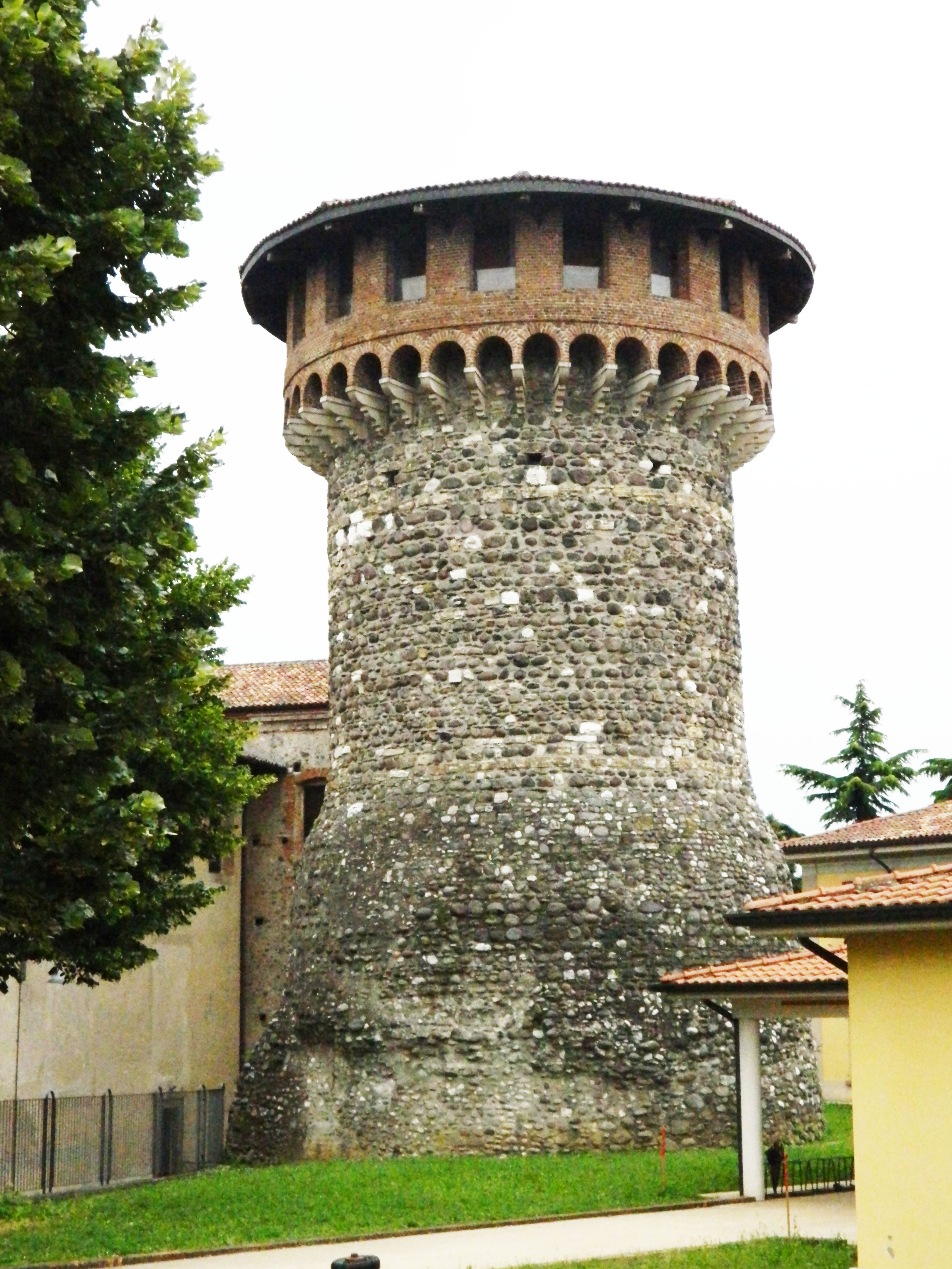 Il Torrione di Mura